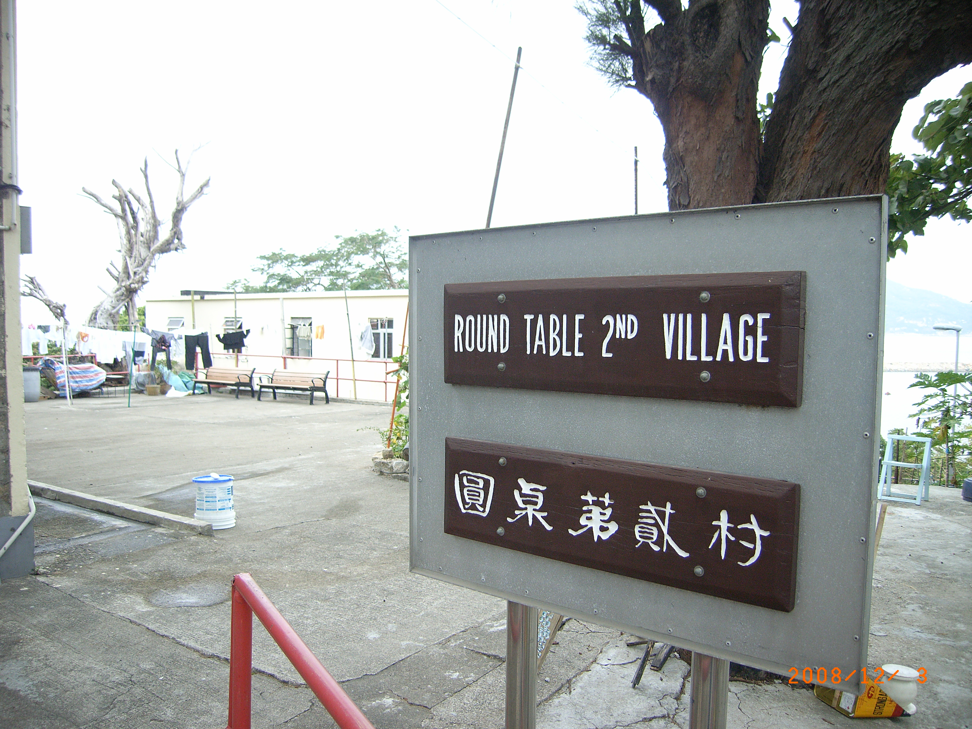 圓桌二村